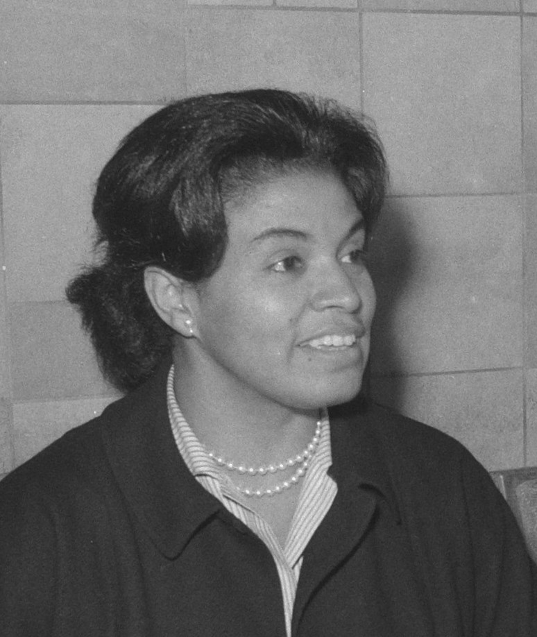 L'artiste lyrique américaine Muriel Smith, à Schiphol en 1960.